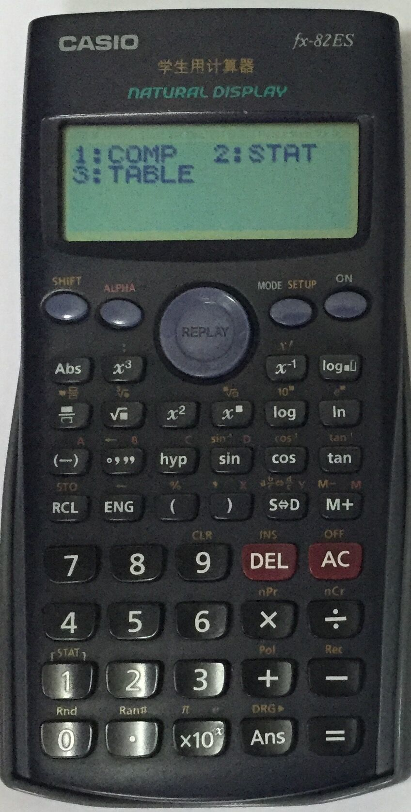 中文（中国大陆）: 卡西欧fx-82ES